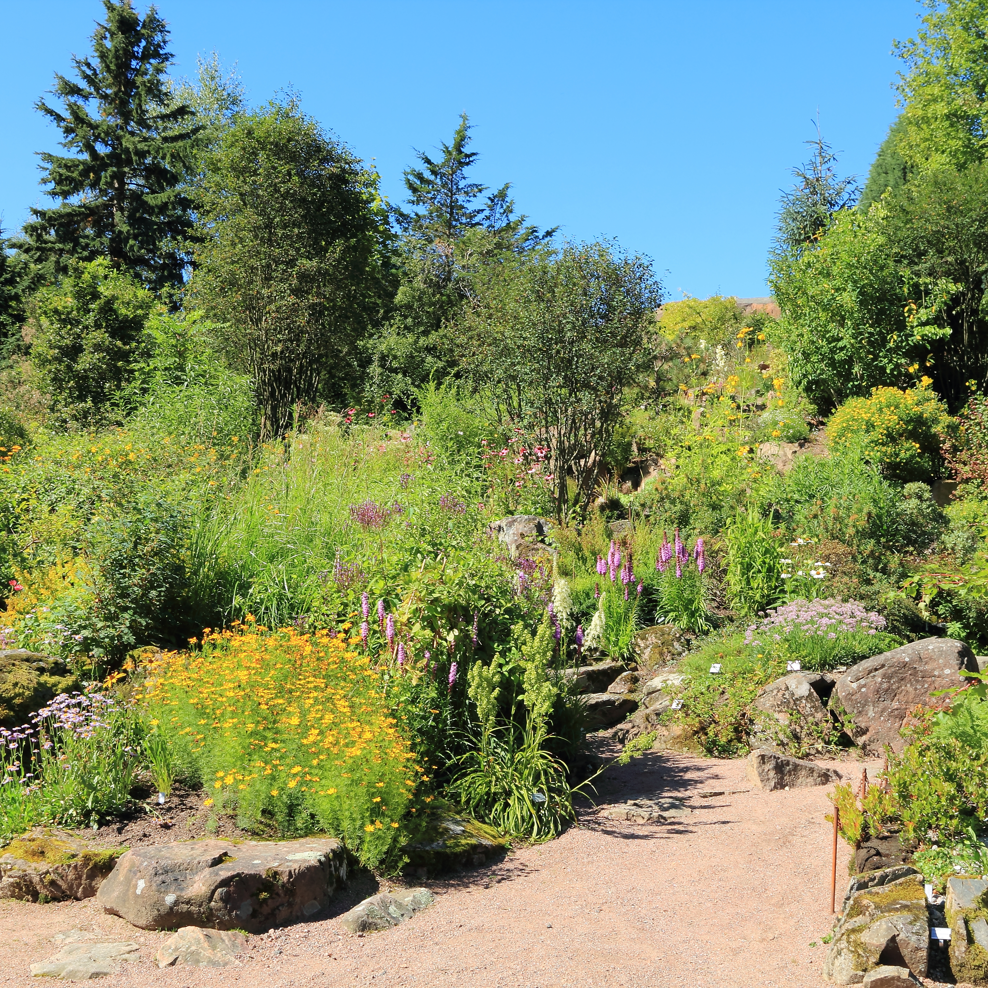 Göteborgs Botaniska Trädgård.